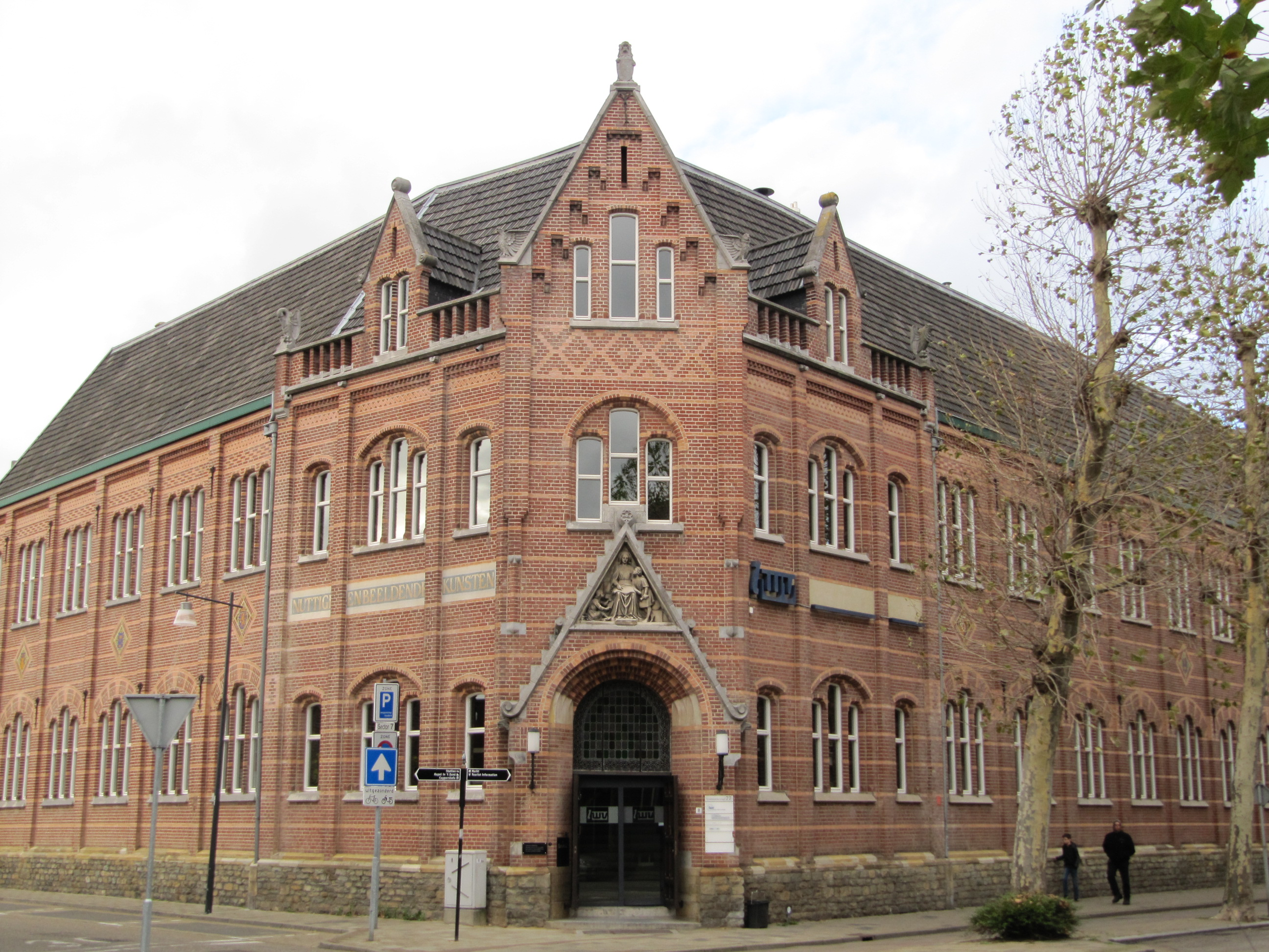 506219 Godsweerderstraat 2